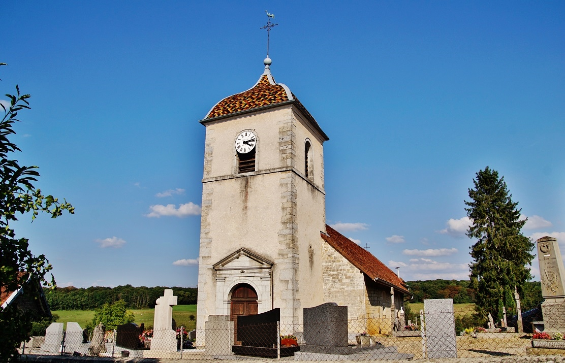 église St Laurent